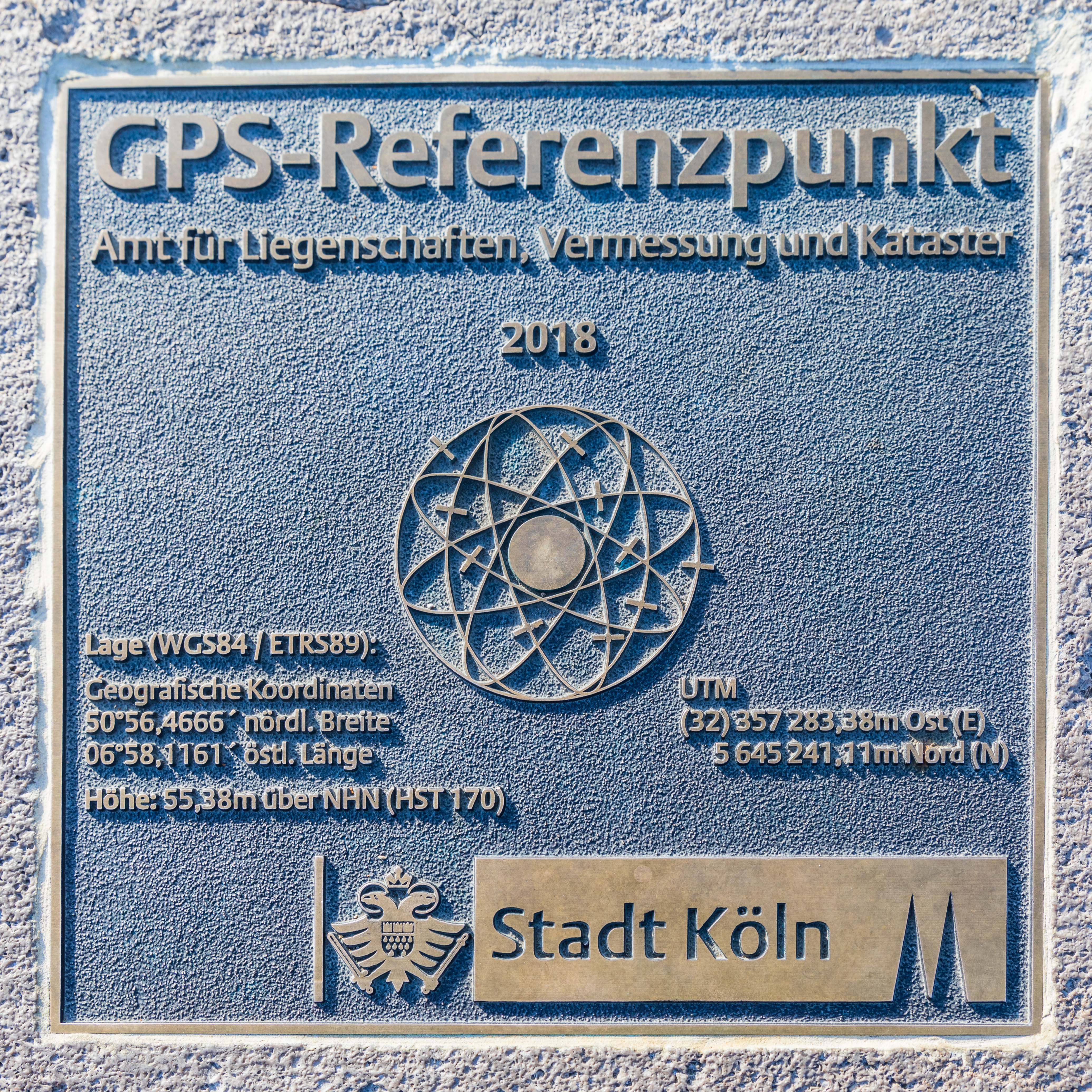 GPS-Referenzpunkt Köln. Standort: Deutzer Seite der Hohenzollernbrücke